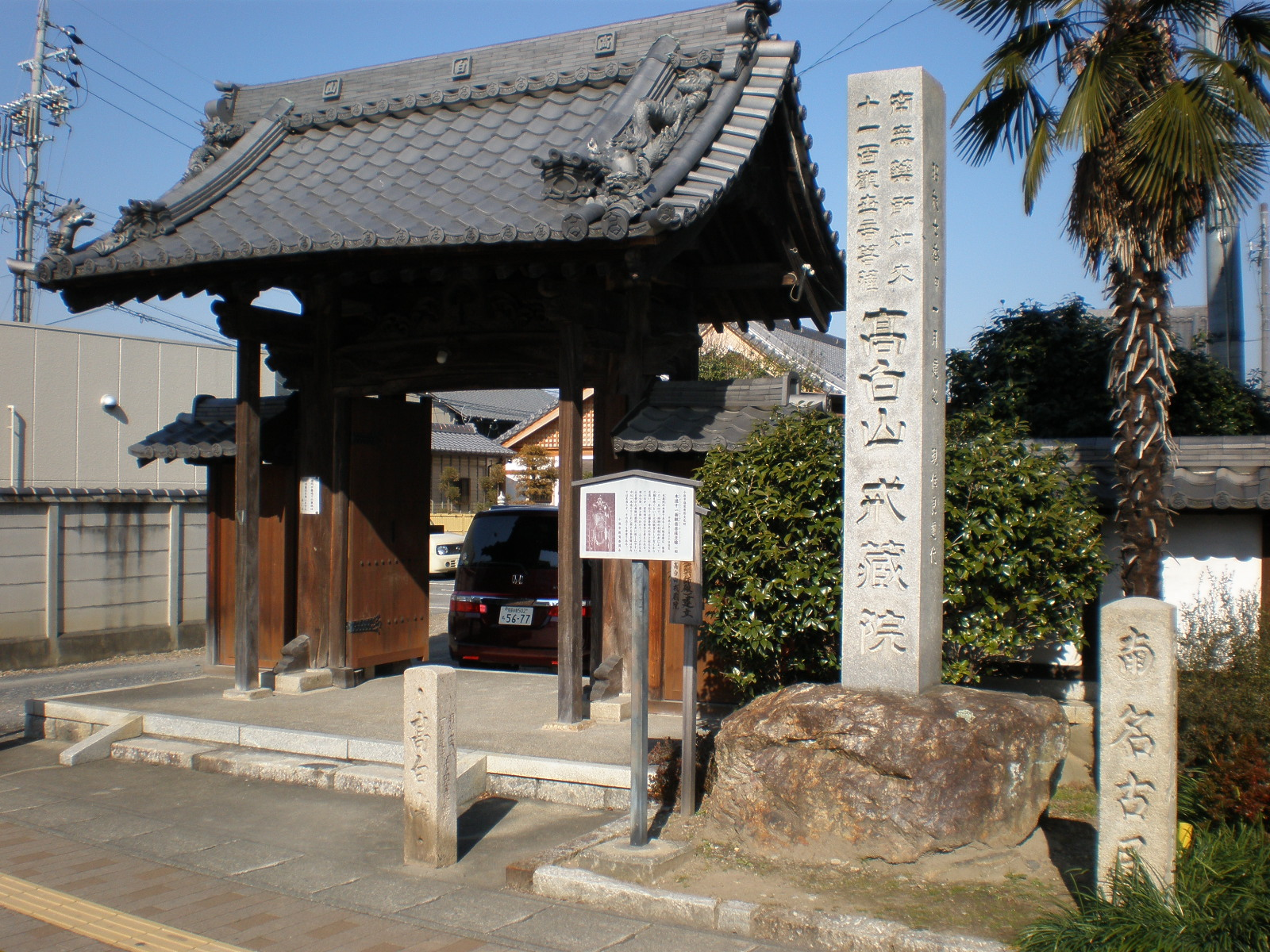 愛知県小牧市にある戒蔵院の山門